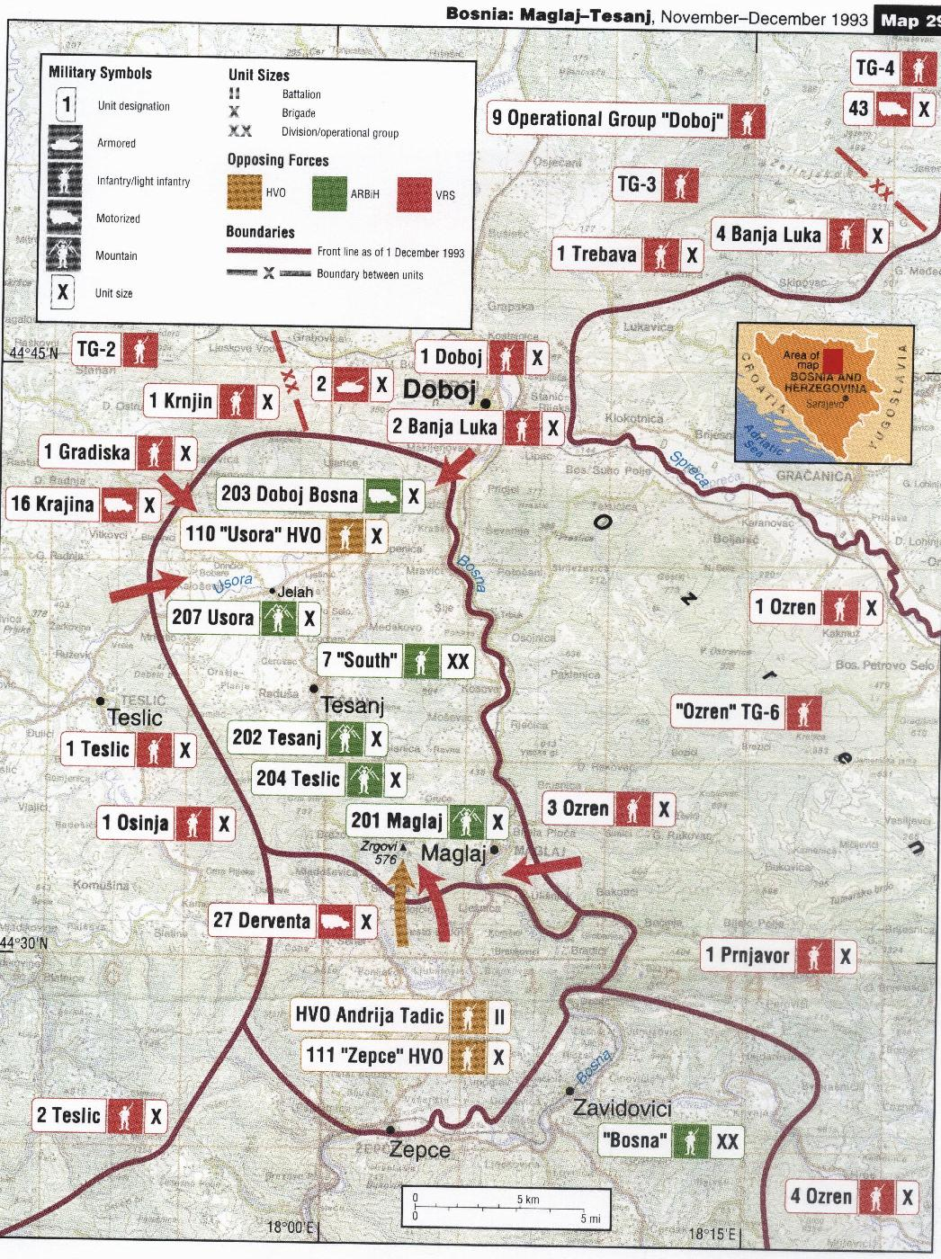 Crte bojišnice između HVO-a i ARBiH te VRS-a, studeni, prosinac 1993.